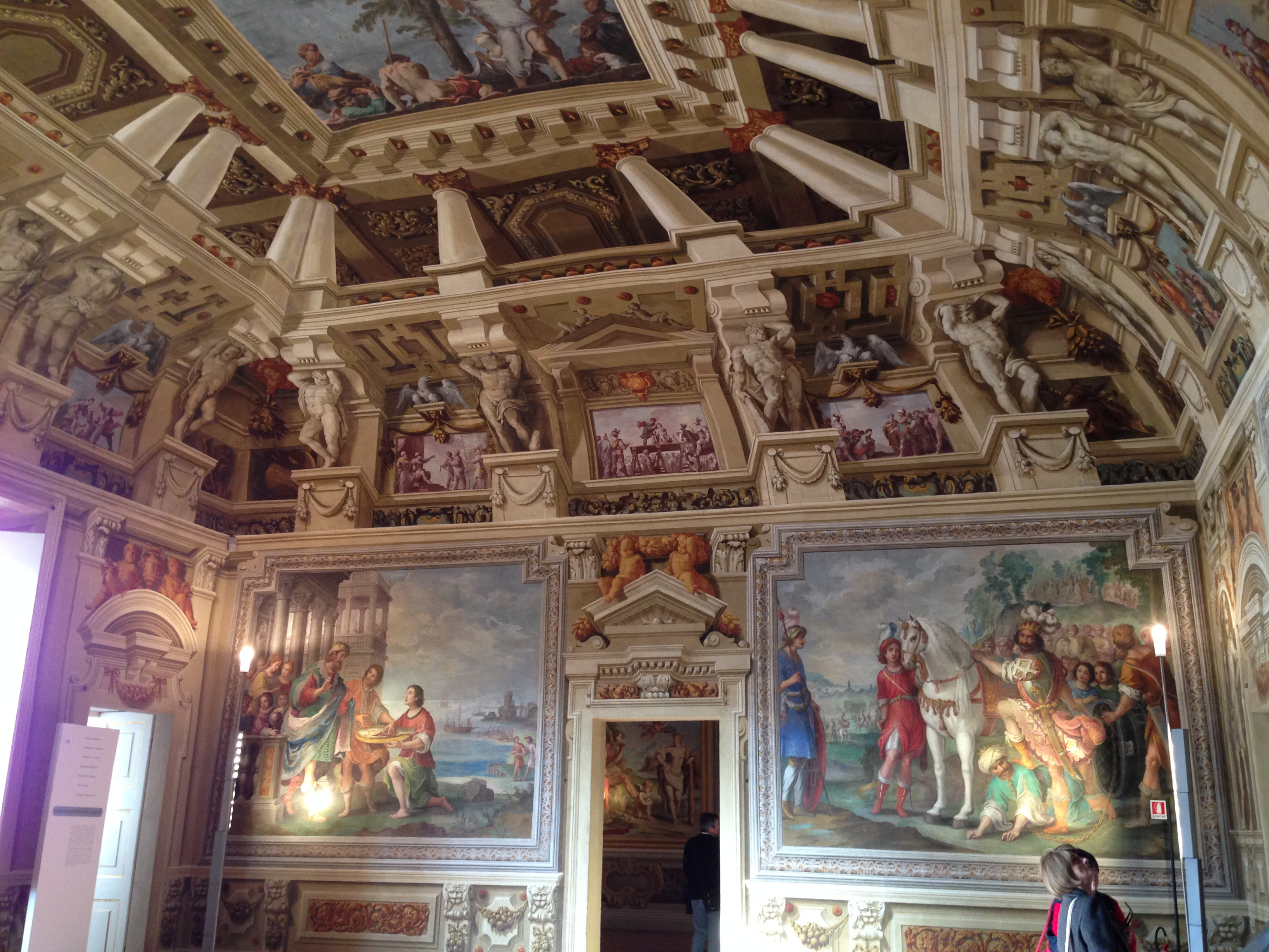 Palazzo e Parco Ducale This is a photo of a monument which is part of cultural heritage of Italy.